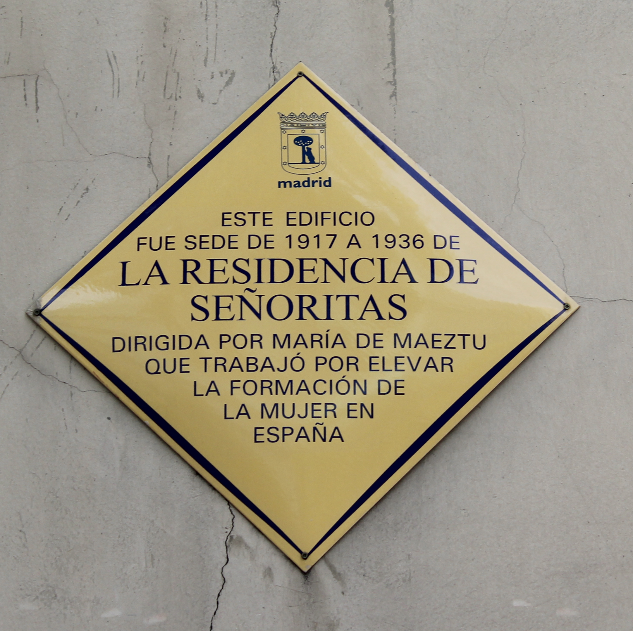 Este edificio fue sede de la Residencia de Señoritas, dirigida por María de Maeztu que trabajó por elevar la formación de la mujer en España.